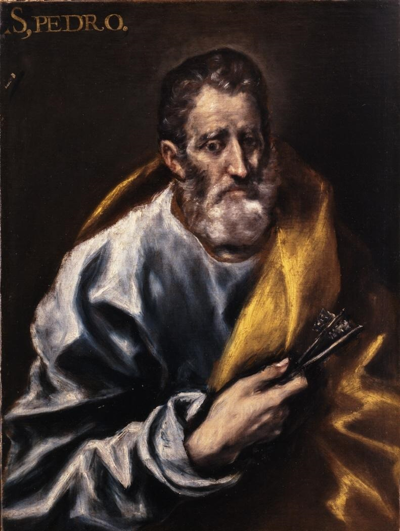 La obra representa a San Pedro Apóstol, primer papa de la Iglesia Católica.